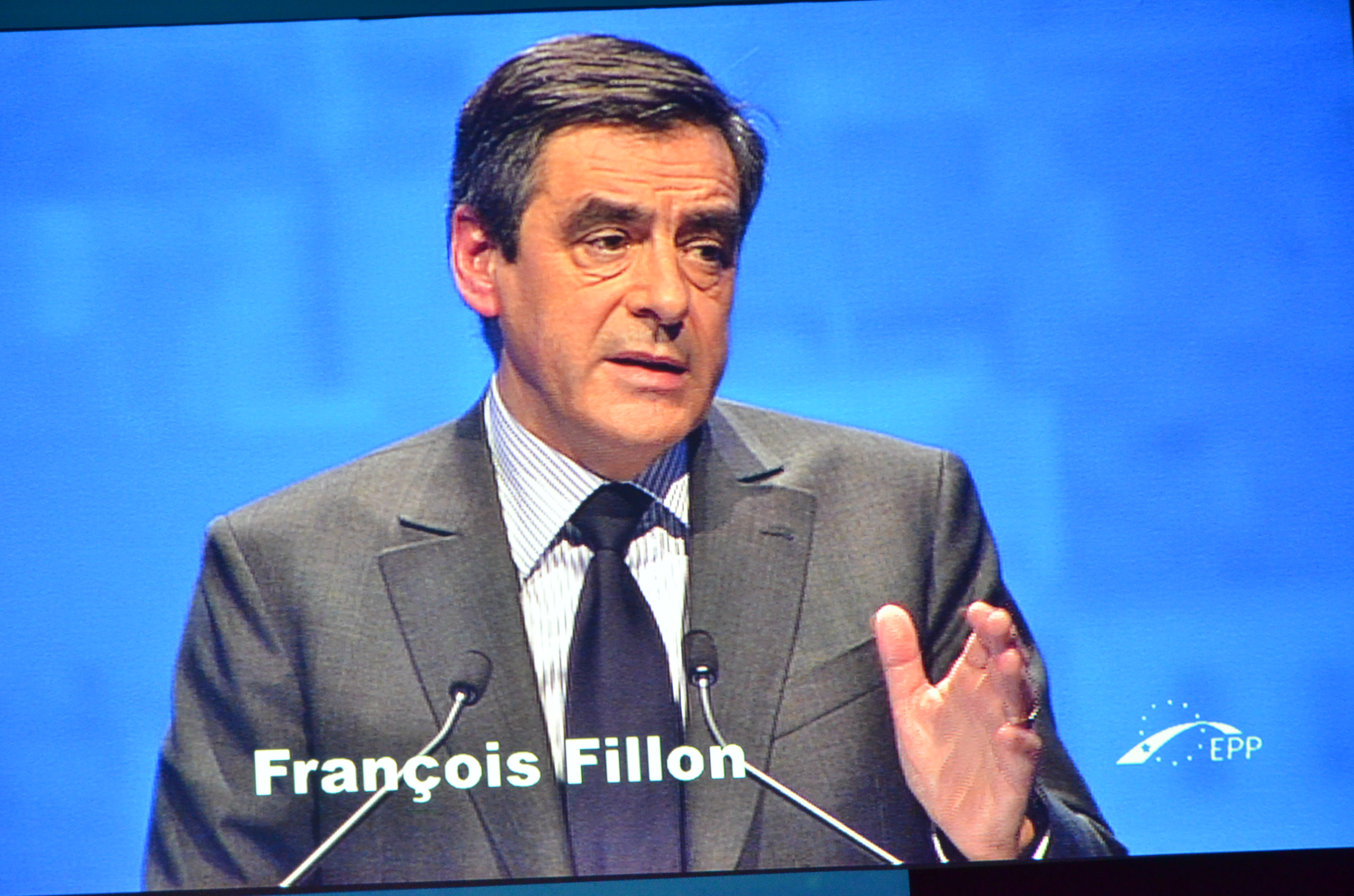 EPP Congress Marseille 0787